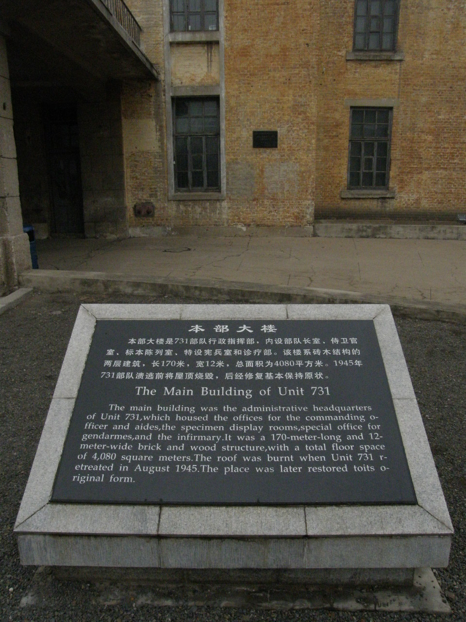 Building on the site of the Harbin bioweapon facility of Unit 731 関東軍防疫給水部本部731部隊（石井部隊） 日軍第731部隊旧址